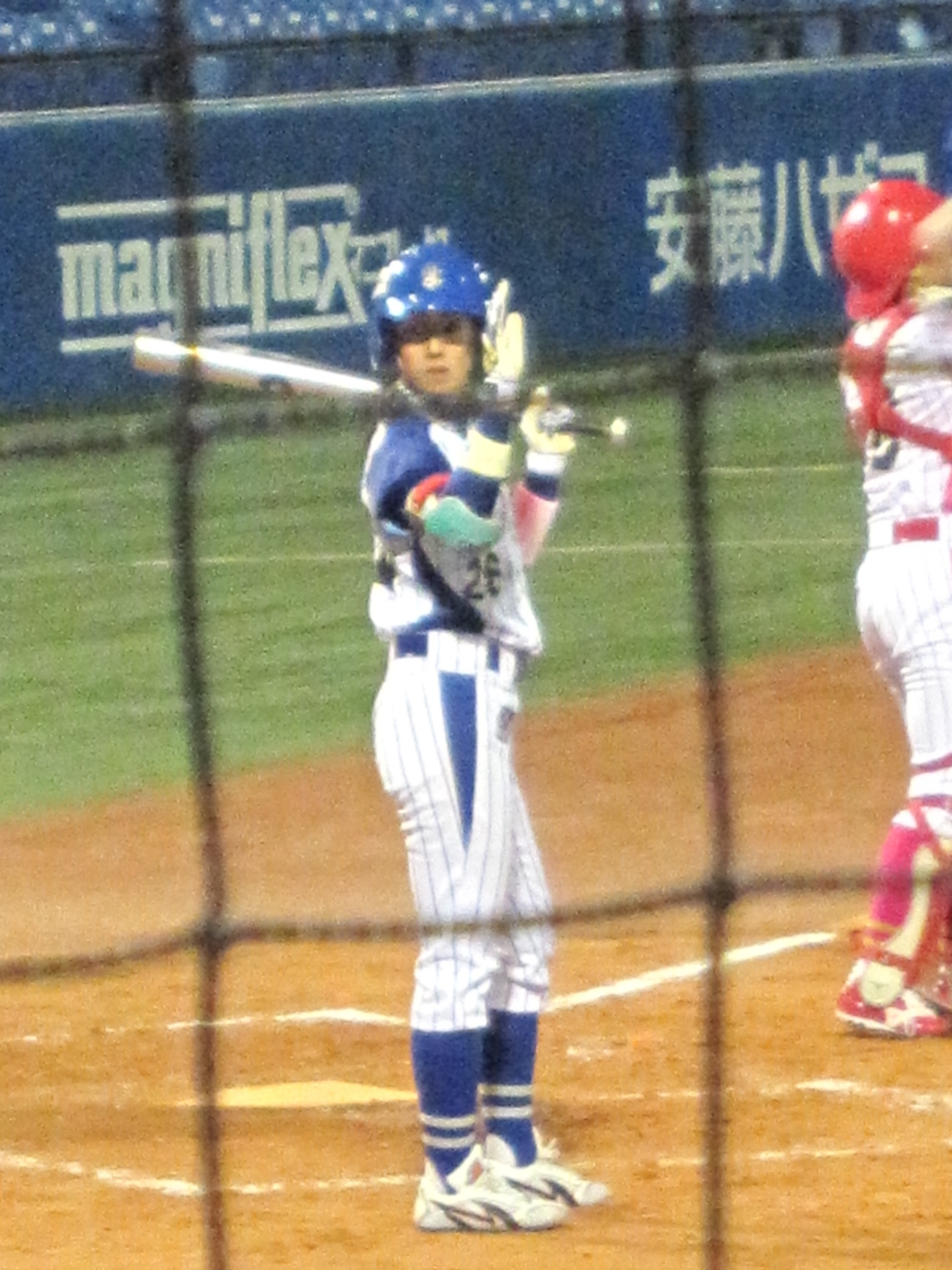 2013年10月27日明治神宮野球場